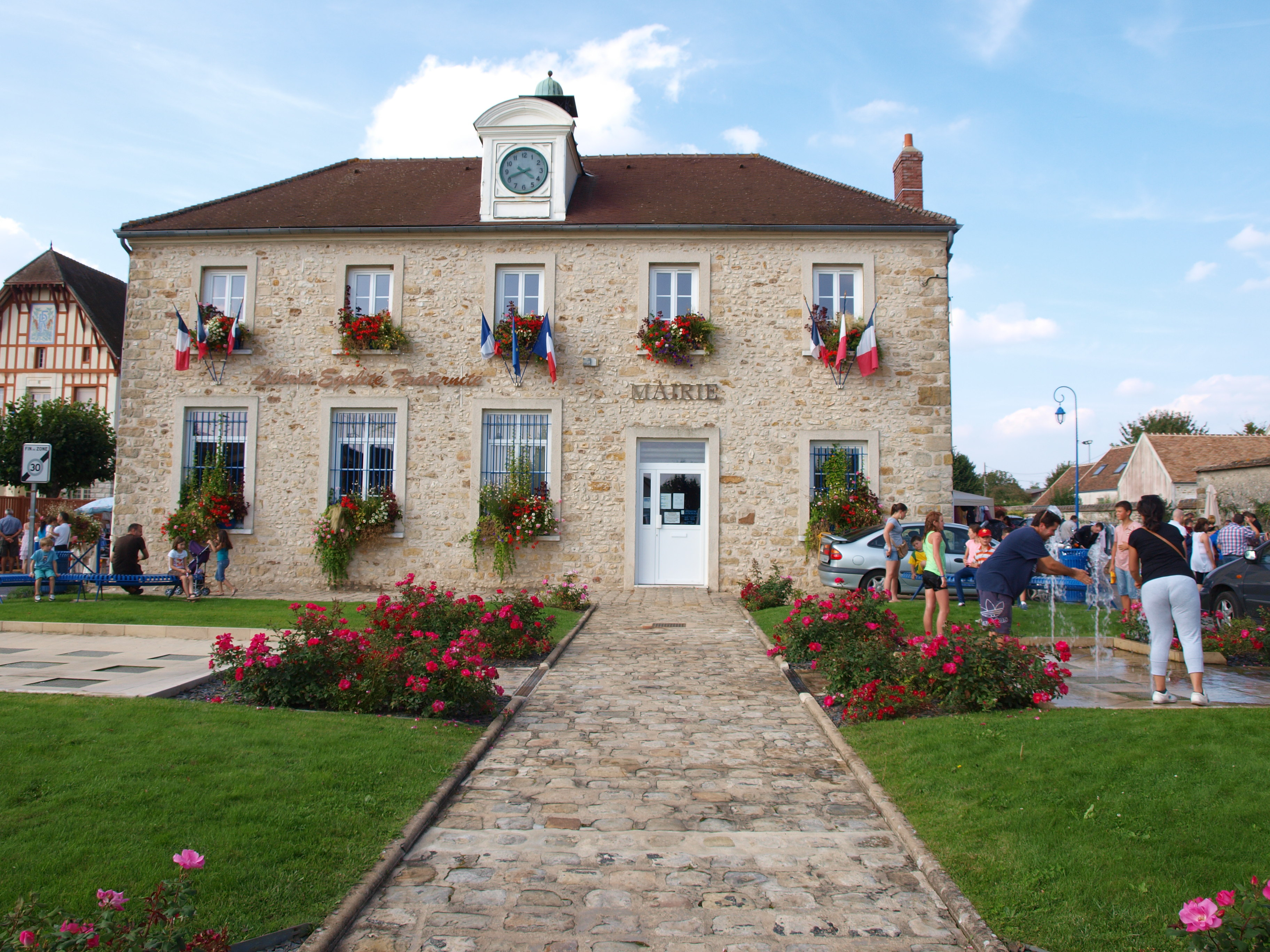 La Grande-Paroisse (Seine-et-Marne, France) ; mairie